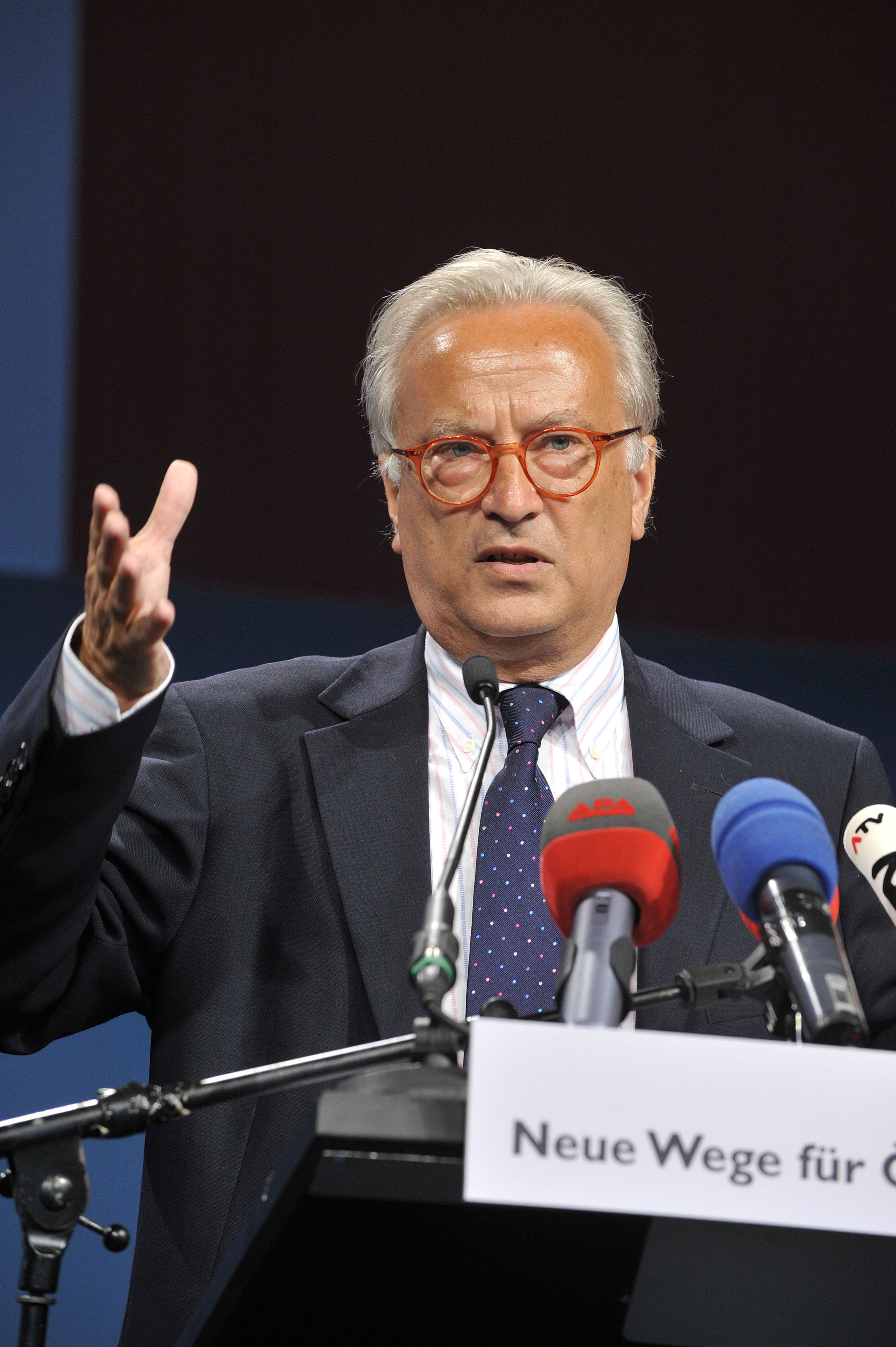 40. Ordentlicher Bundesparteitag 2008 im Linzer Design-Center. Foto: Johannes Zinner.